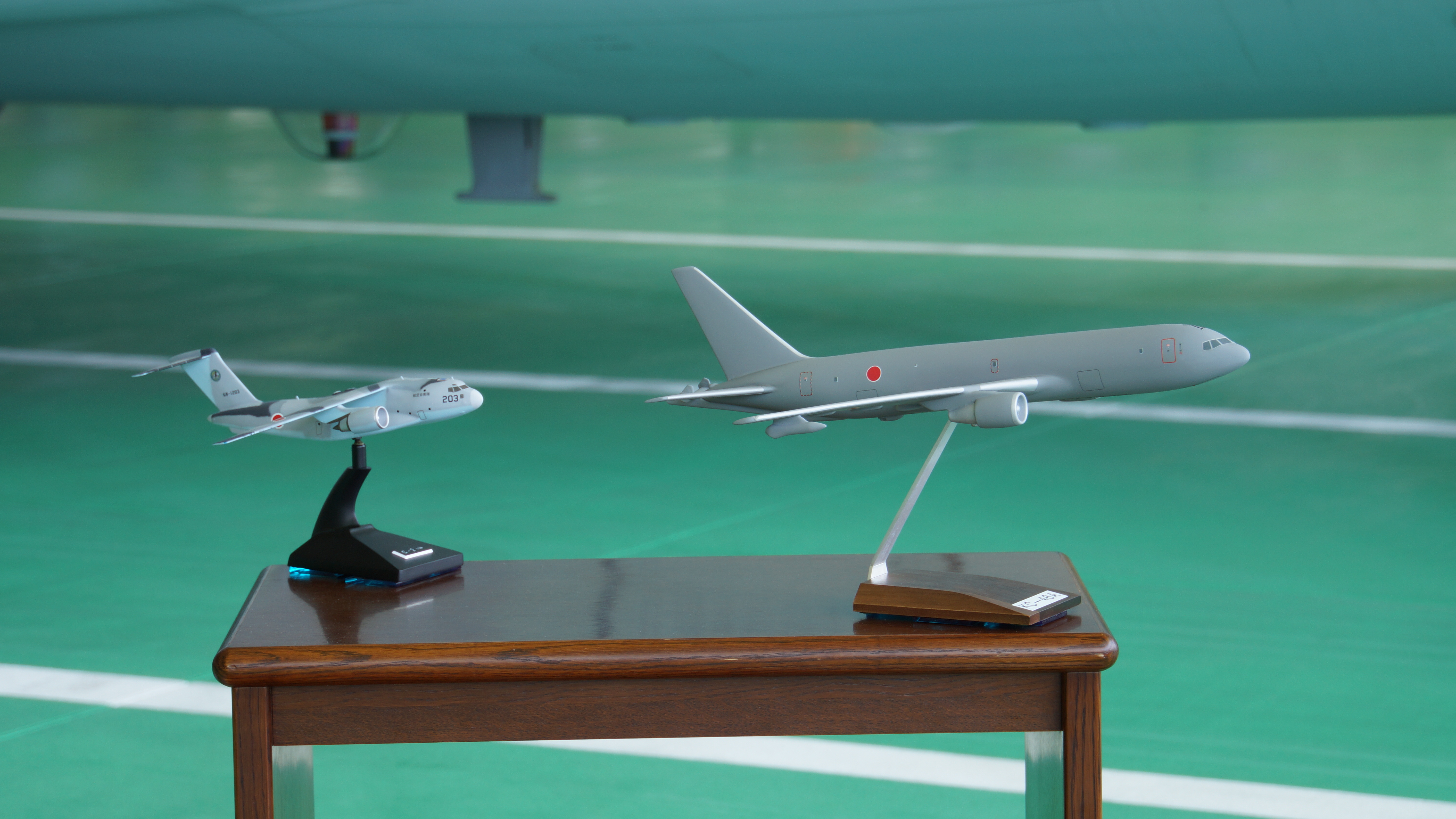 航空自衛隊 KC-46A空中給油・輸送機及びC-2輸送機（68-1203号機） 模型。2017年5月28日 美保基地にて。